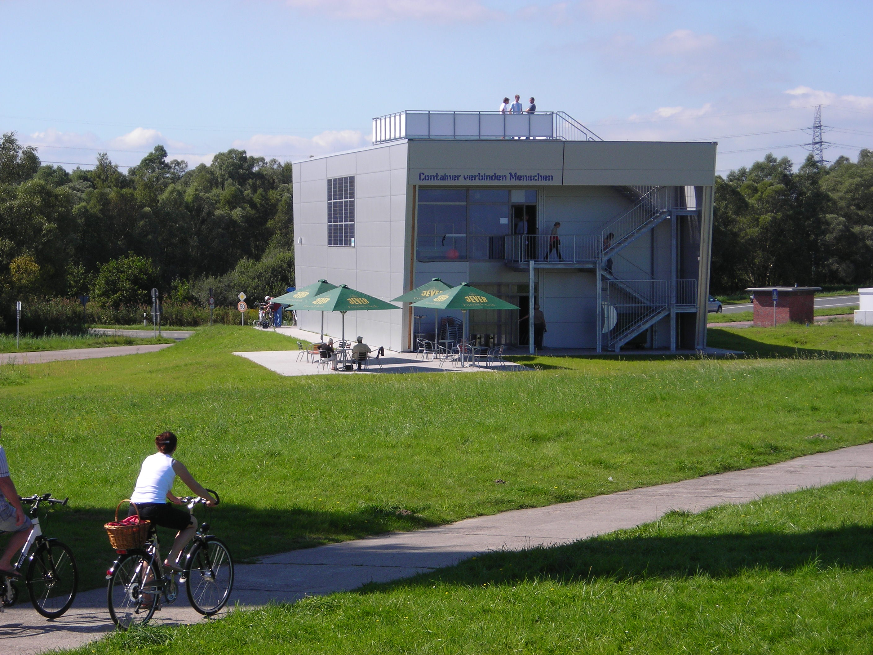 Die Infobox am Containerhafen JadeWeserPort in Wilhelmshaven